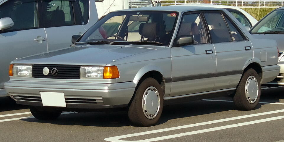 日産・サニー（B12型）